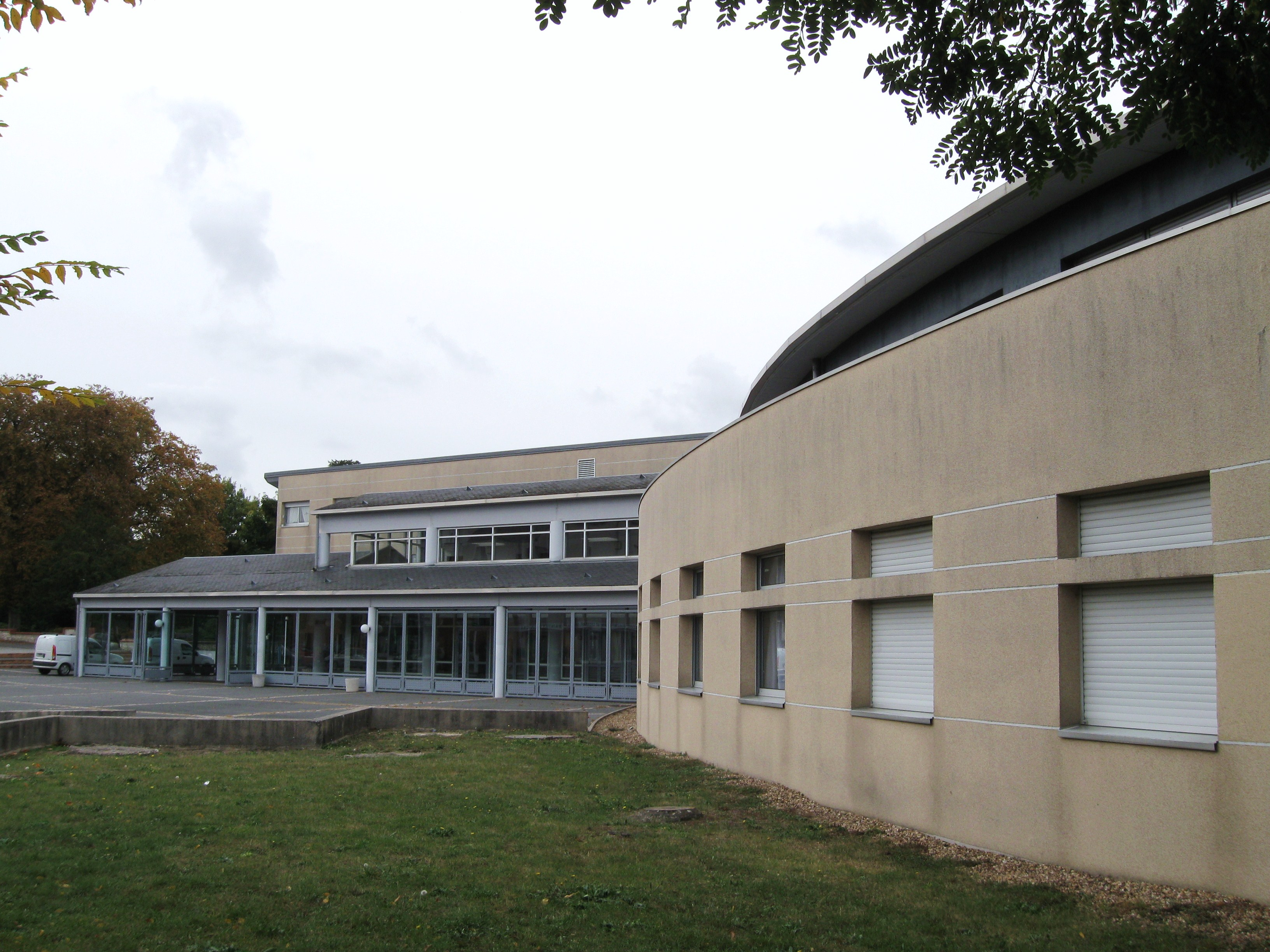 Lycée Maurice Genevoix, Ingré, Loiret, France